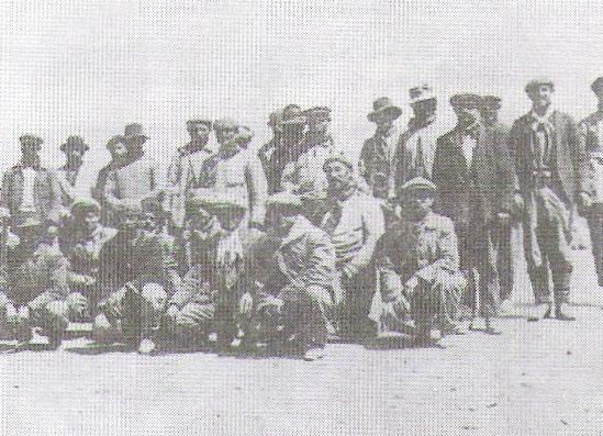 Huelguistas prisioneros en Tres Cerros